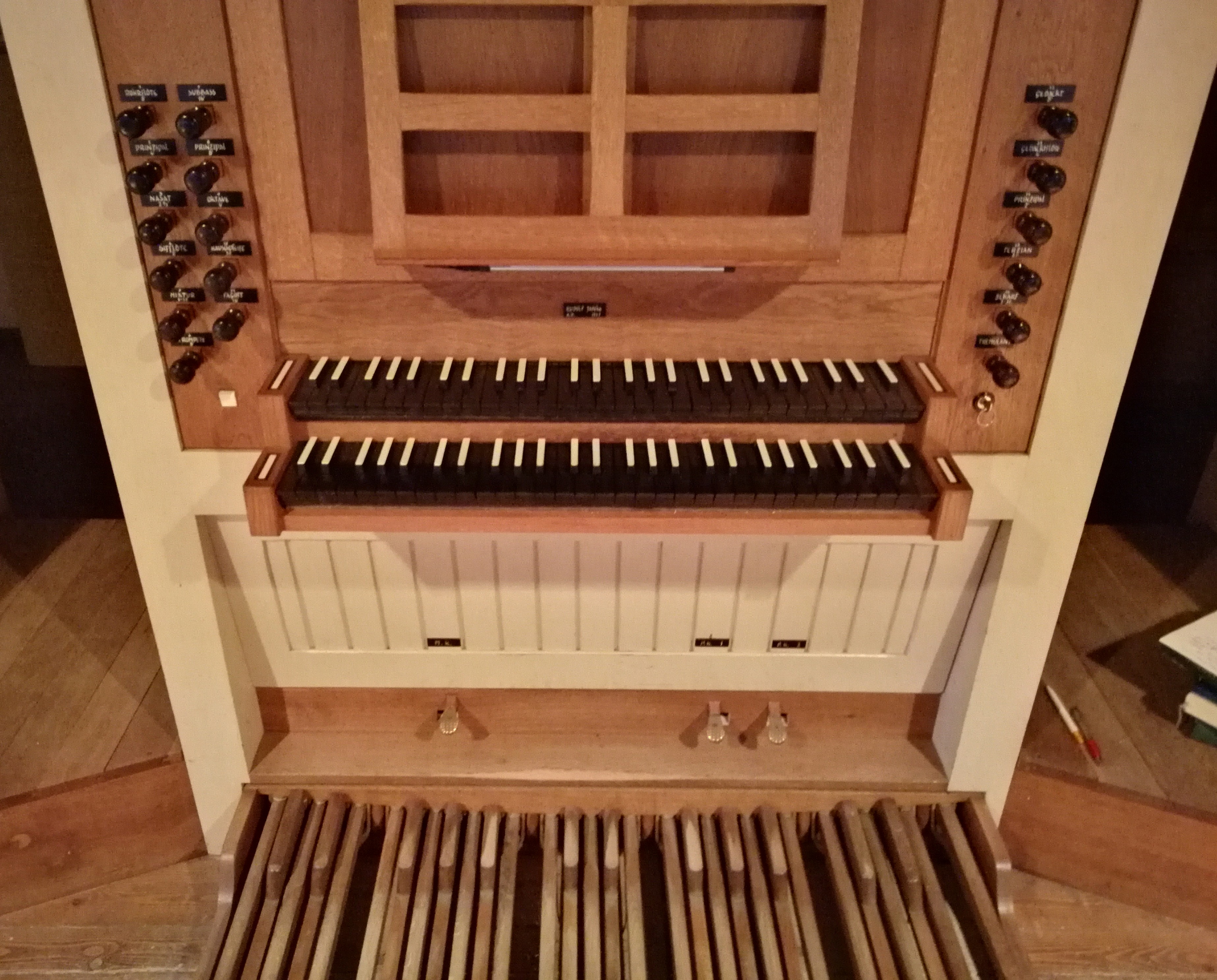 St. Christophorus Reinhausen, Landkreis Göttingen, Niedersachsen, Deutschland